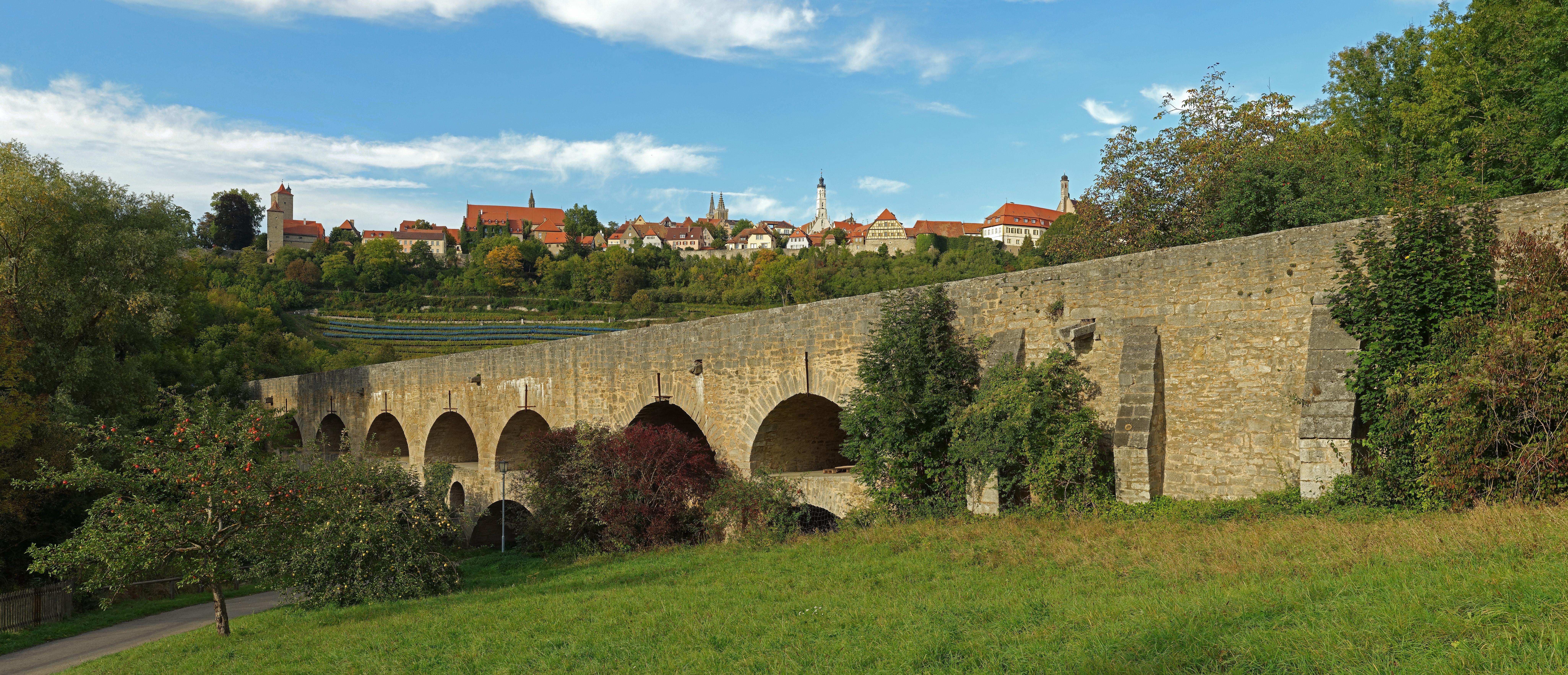 Die Tauberbrücke Rothenburg ob der Tauber ist eine historische Straßenbrücke, die die Tauber überspannt. Die 123 Meter lange Doppelbrücke wurde wahrscheinlich um 1330 errichtet. Im Zweiten Weltkrieg wurde die Brücke gesprengt und 1956 wieder aufgebaut. Etwa 70 Meter oberhalb befindet sich die Kleinstadt Rothenburg ob der Tauber mit einer vollständig erhaltenen Stadtmauer.